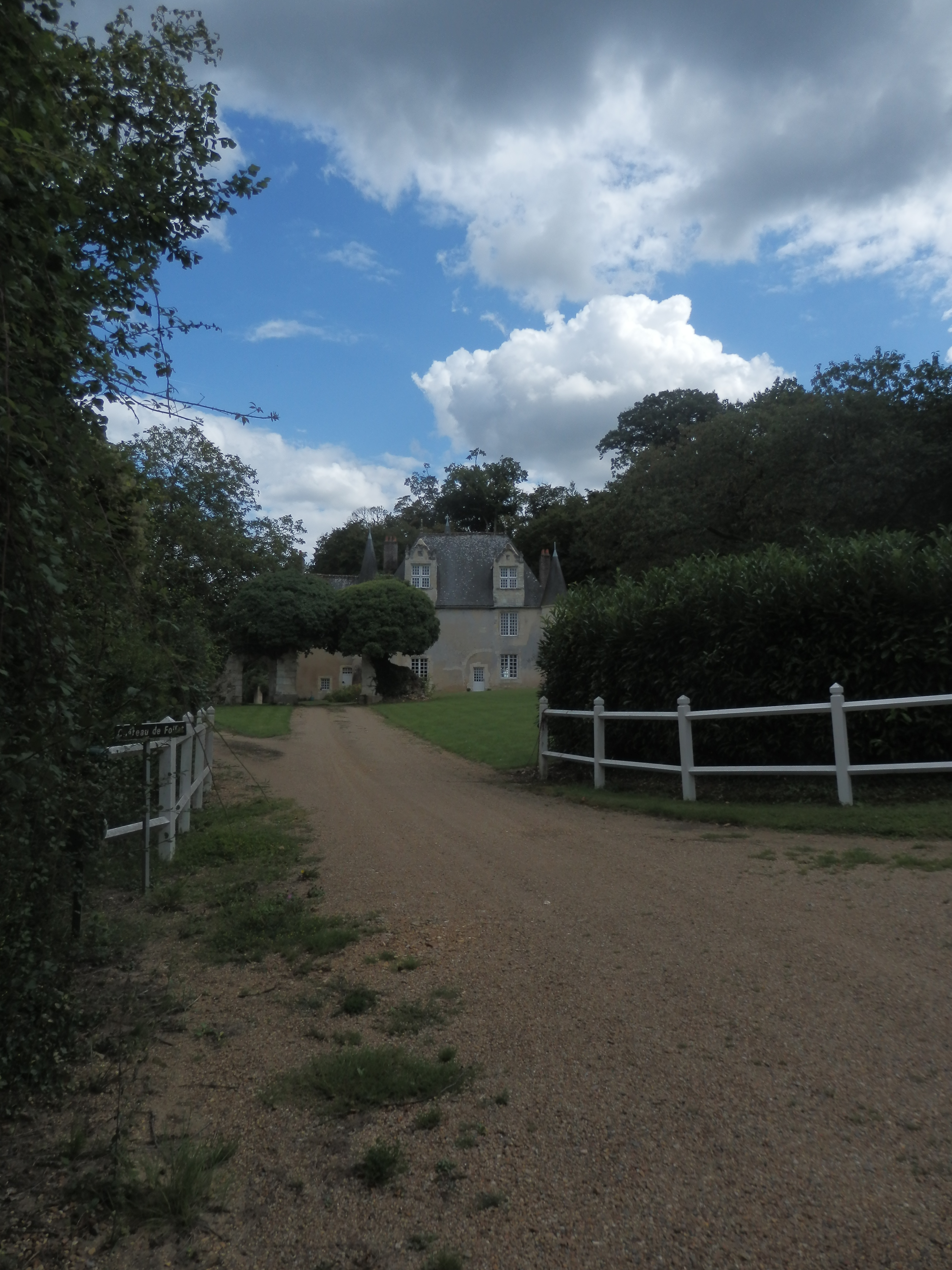 Vue de l'entrée du château